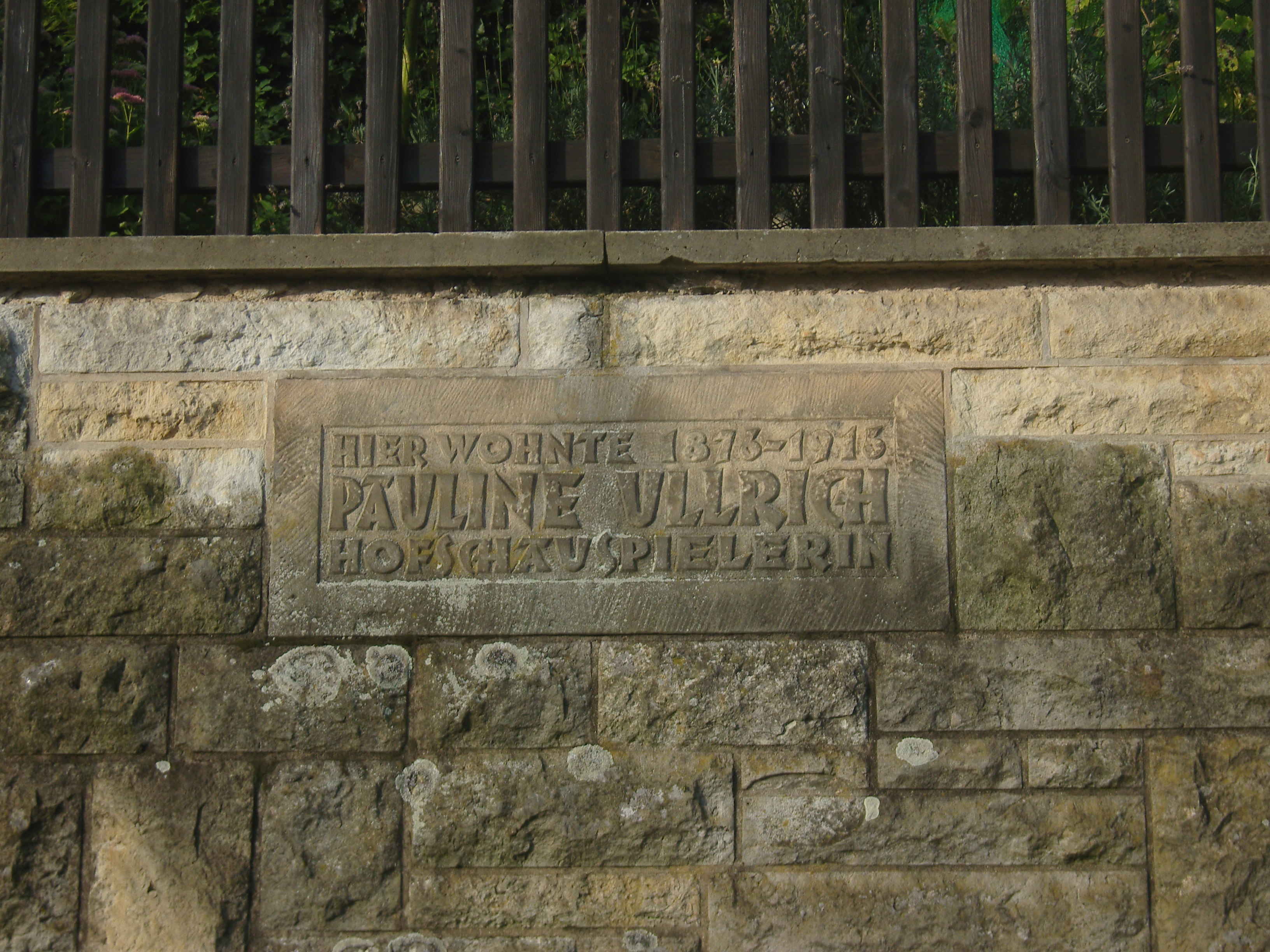 Denkmalgeschützte Gedenkttafel am ehemaligen Wohnhaus der Hofschauspielerin Pauline Ulrich am Körnerweg 12 in Dresden-Loschwitz